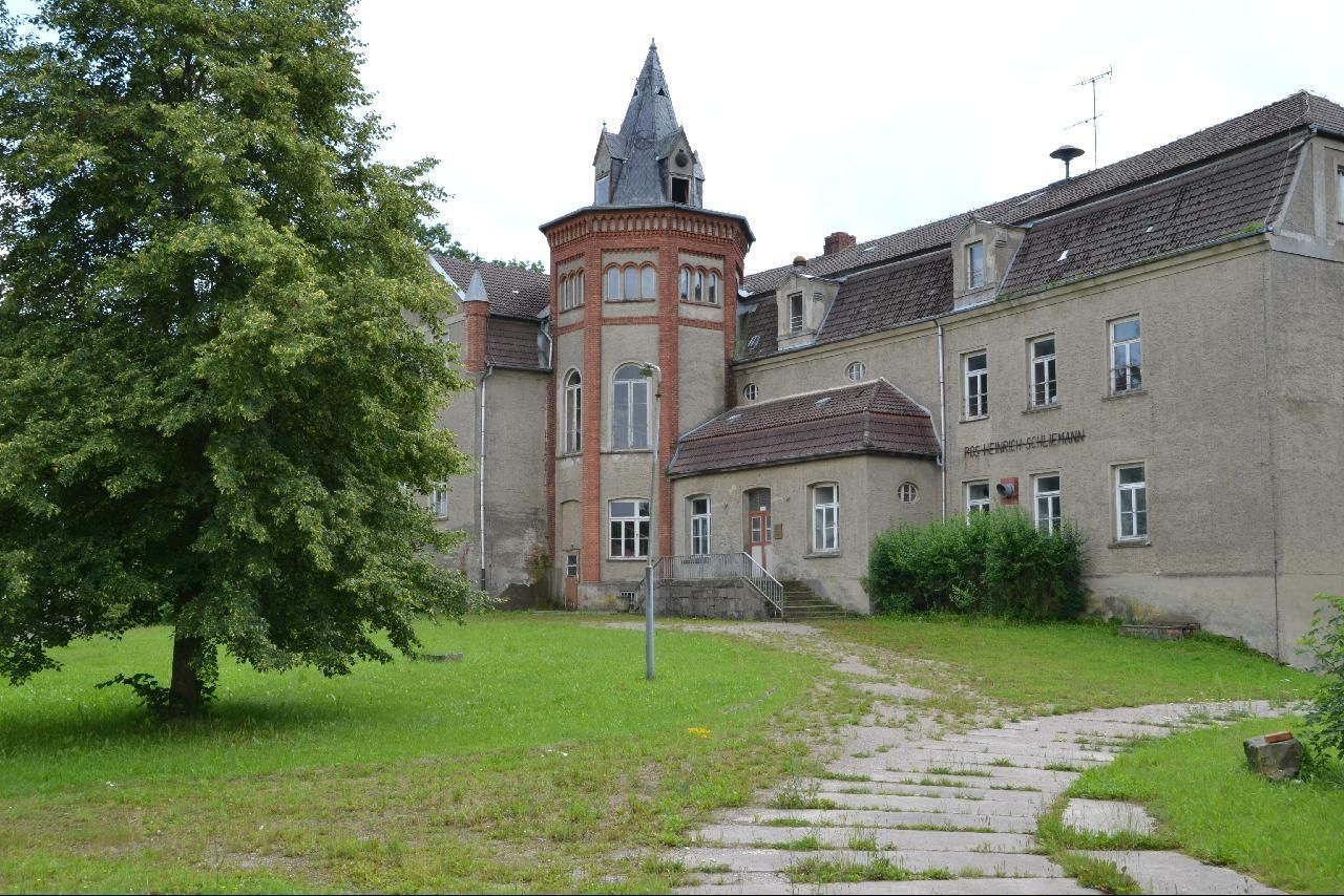 Gutshaus Ankershagen (bei Neubrandenburg)